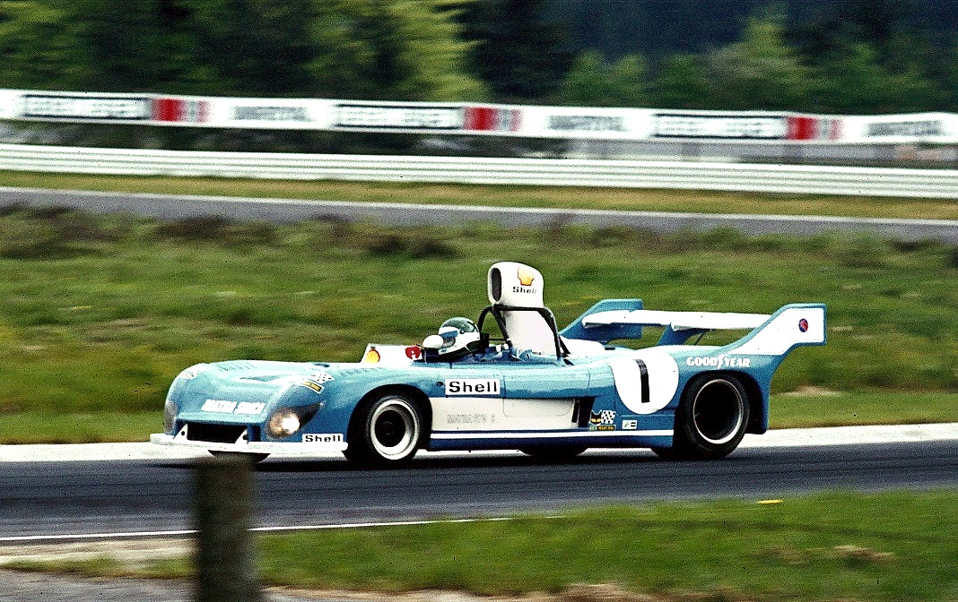 Matra Simca 670C mit Jean Pierre Jarier beim 1000-km-Rennen auf dem Nürburgring (Südkehre)